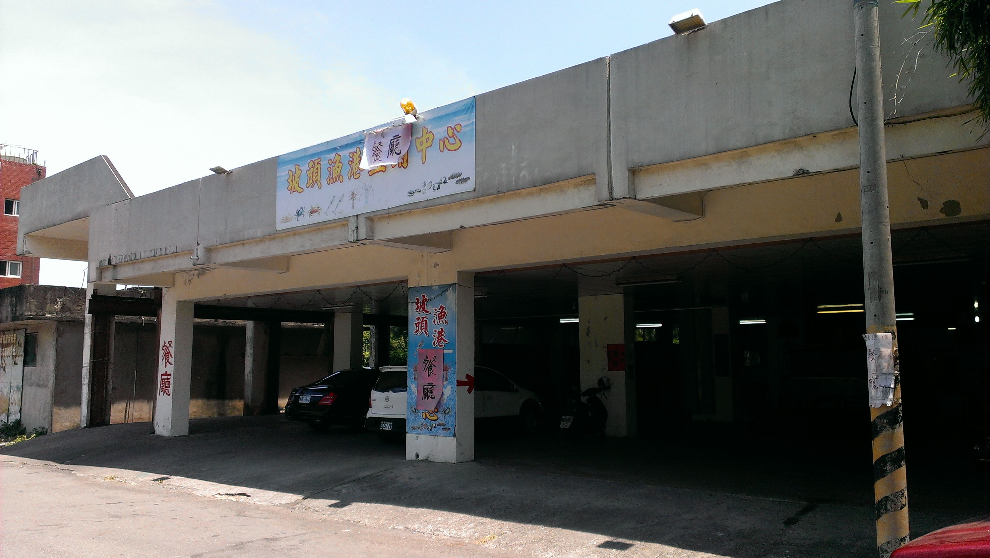 中文（台灣）: 坡頭漁港直銷中心